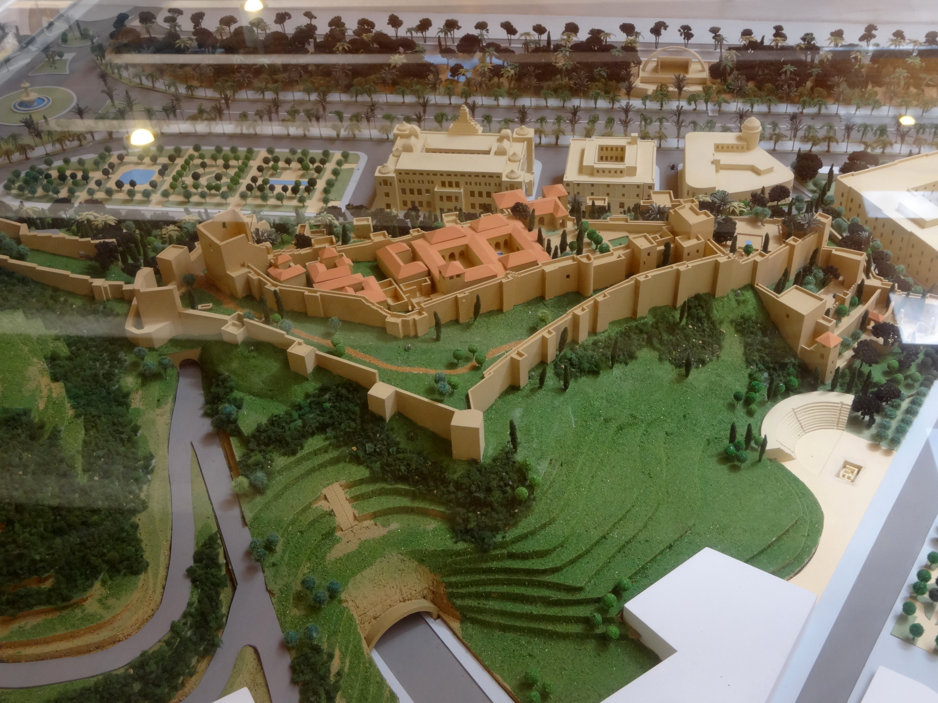 Alcazaba de Málaga (España).